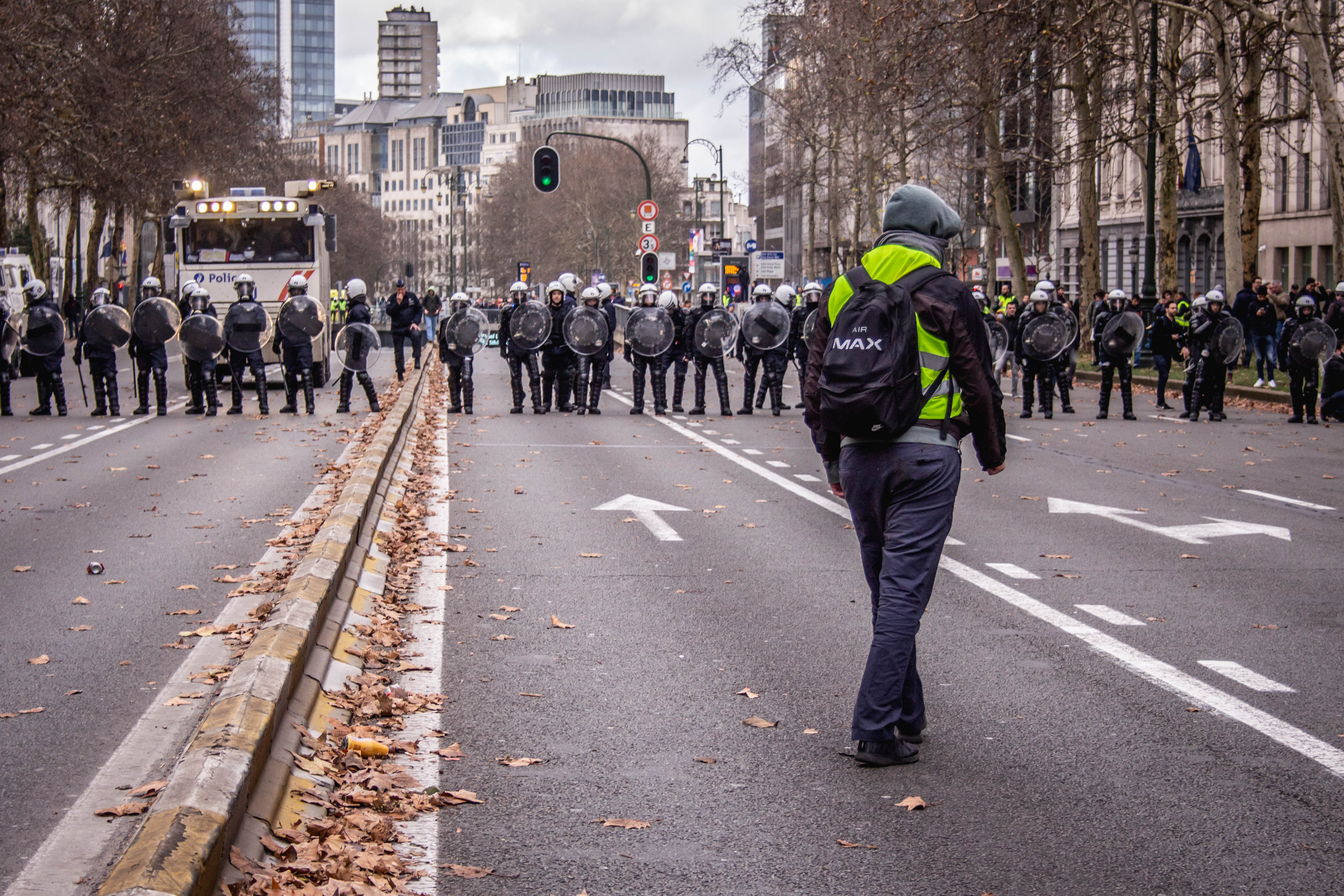 2018-12-08 Brussel gele hesjes